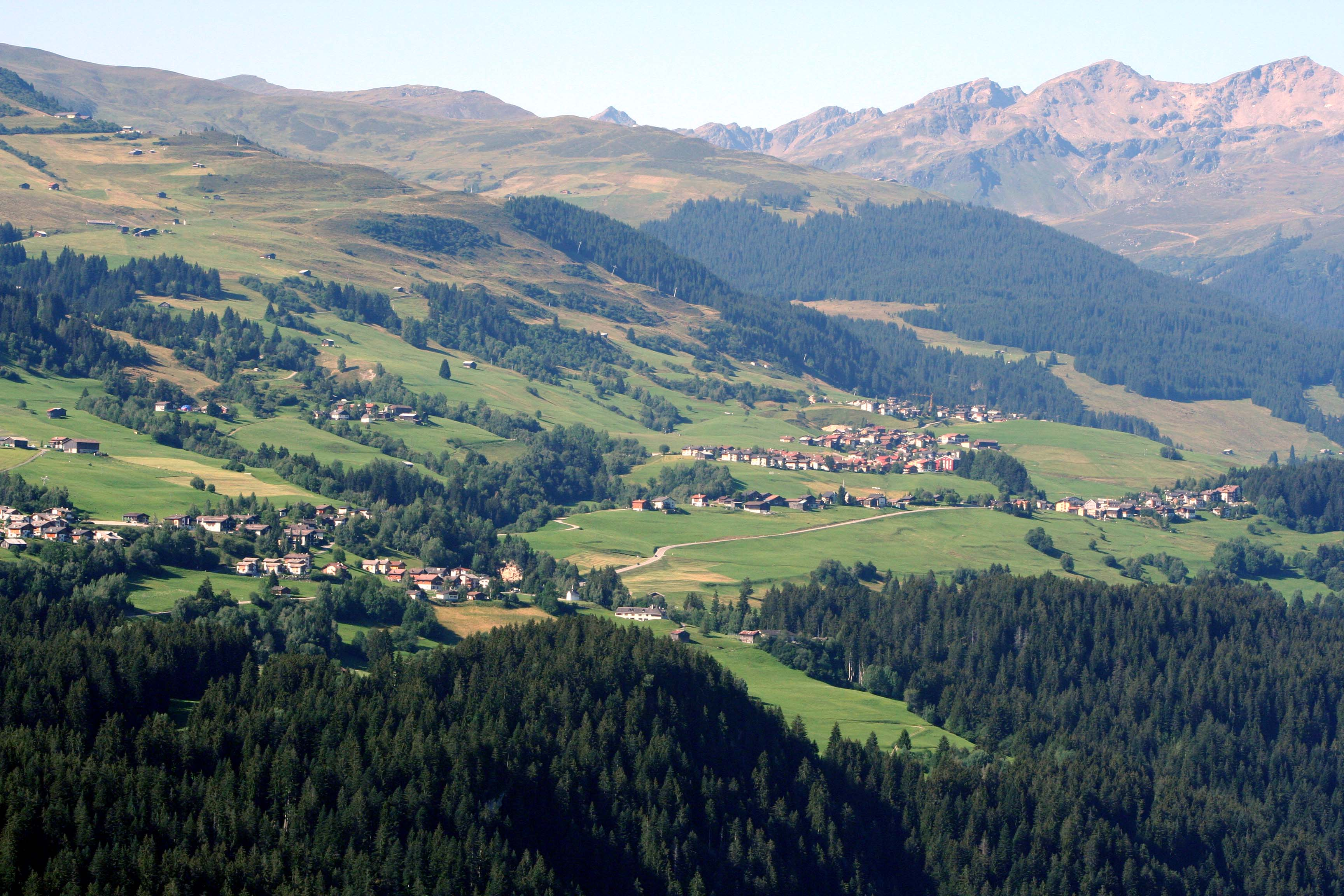 Obersaxen